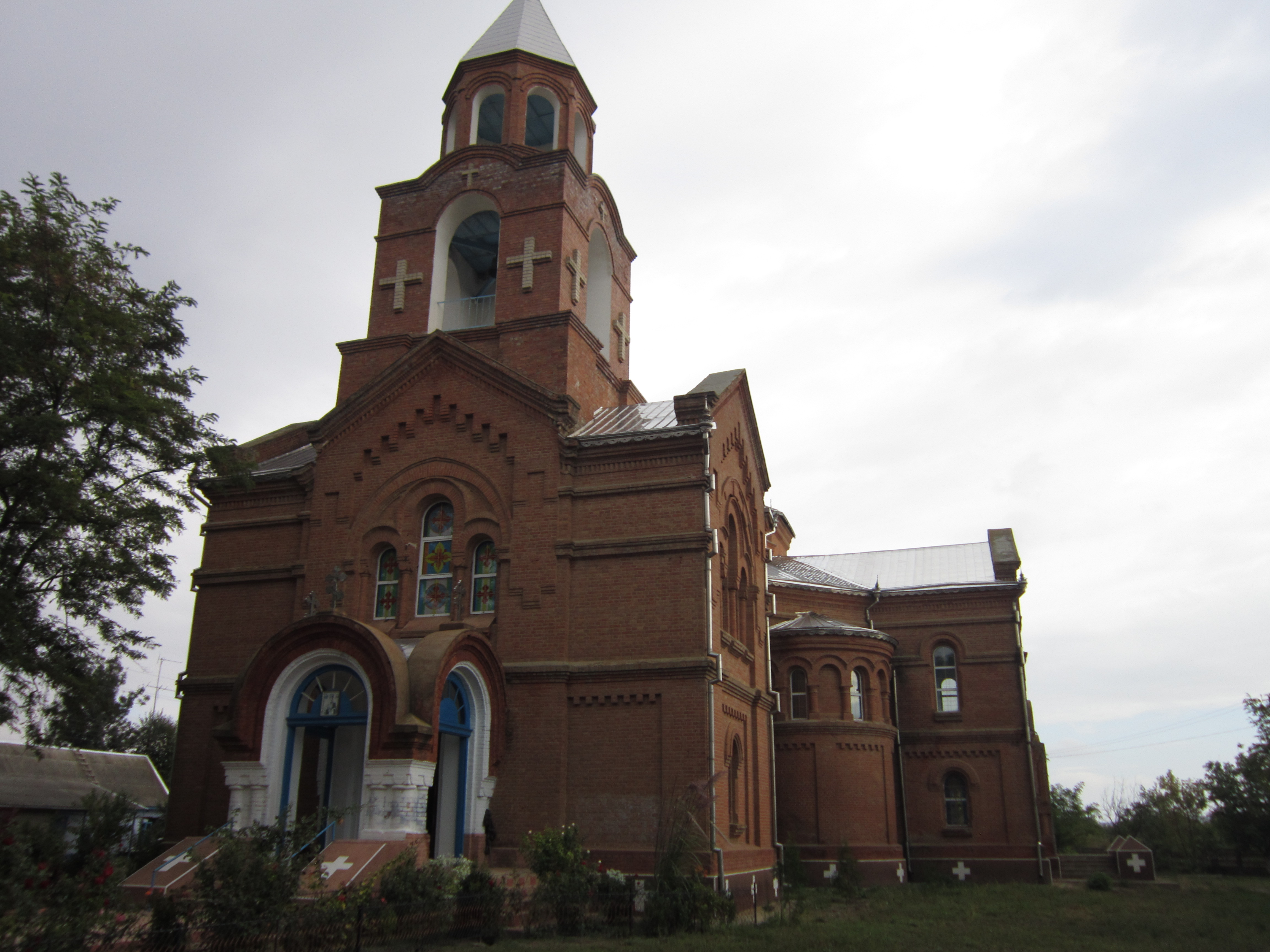 Церква Троїцька, с. Троїцьке, вул. Мала